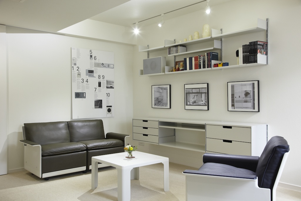 Vitsoe Tokyo